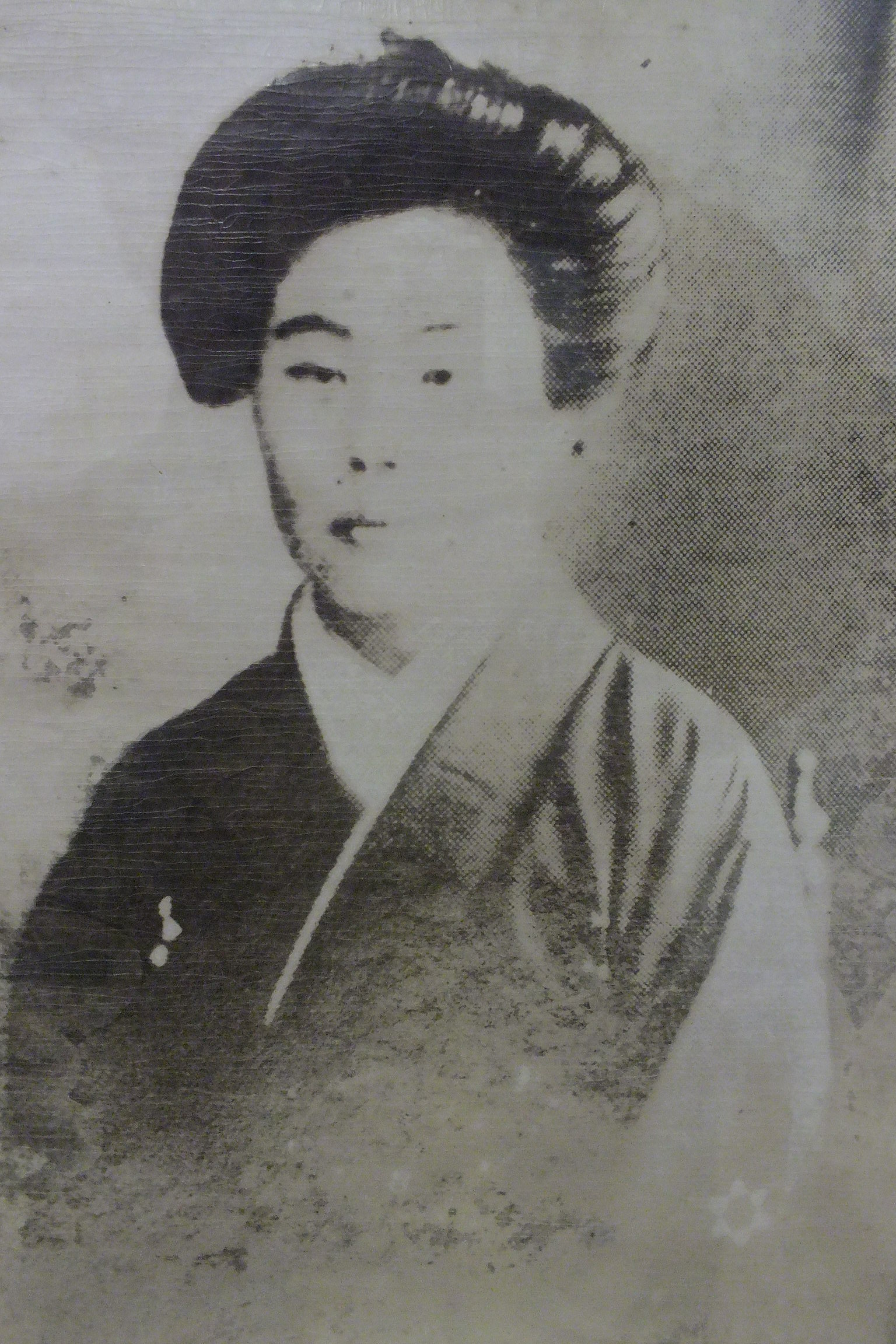 photograph of Chizuko Mifune taken in 1910. DSCF4747